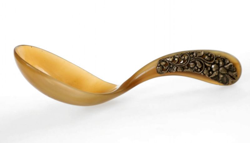 Schep. Hoornen rijstlepel met zilveren greep